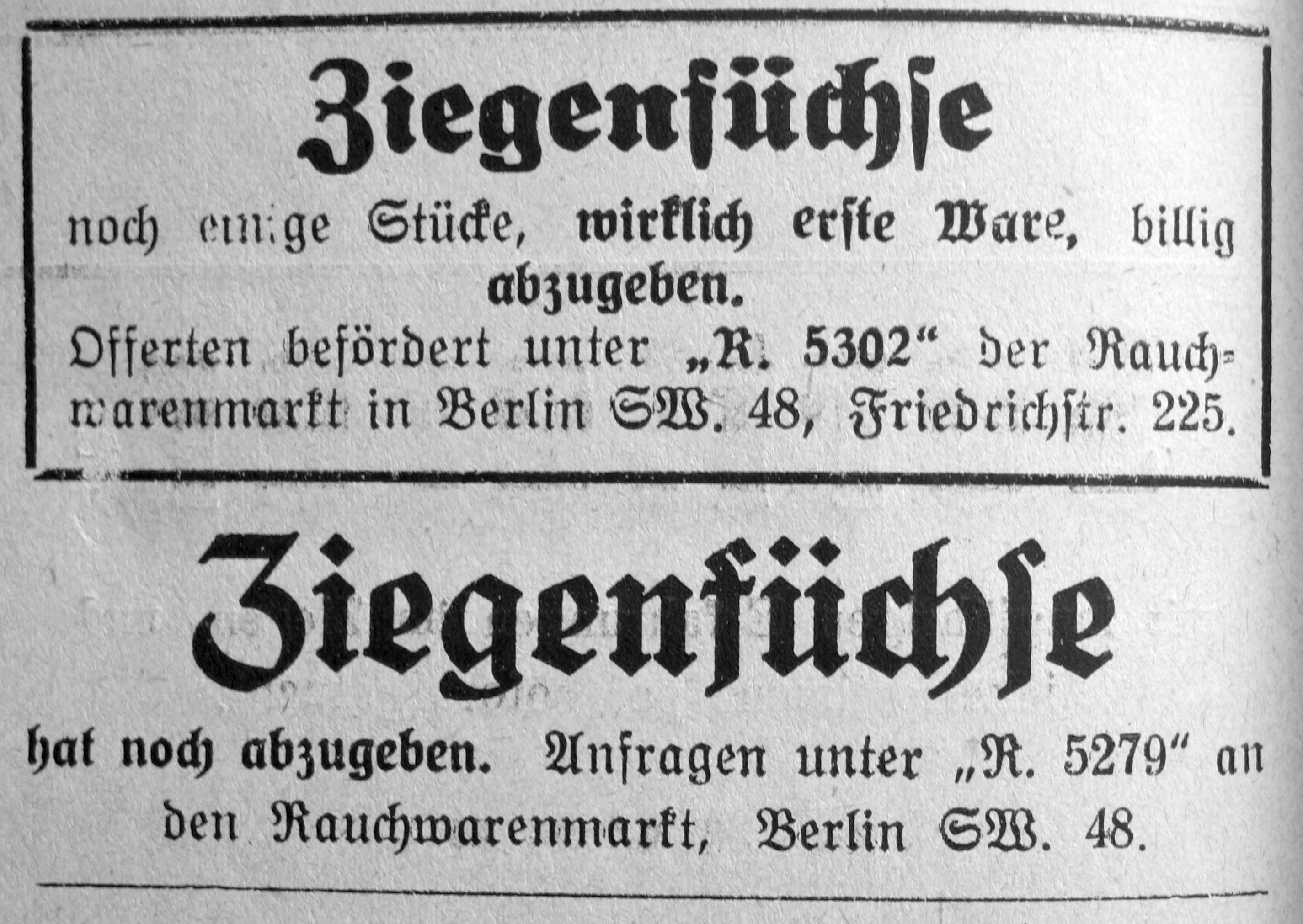 Zwei Anzeigen für Ziegenfuchsfelle (langhaarige, fuchsähnliche Ziegenfelle). Anzeigen in einer Pelz-Fachzeitung, 1924.